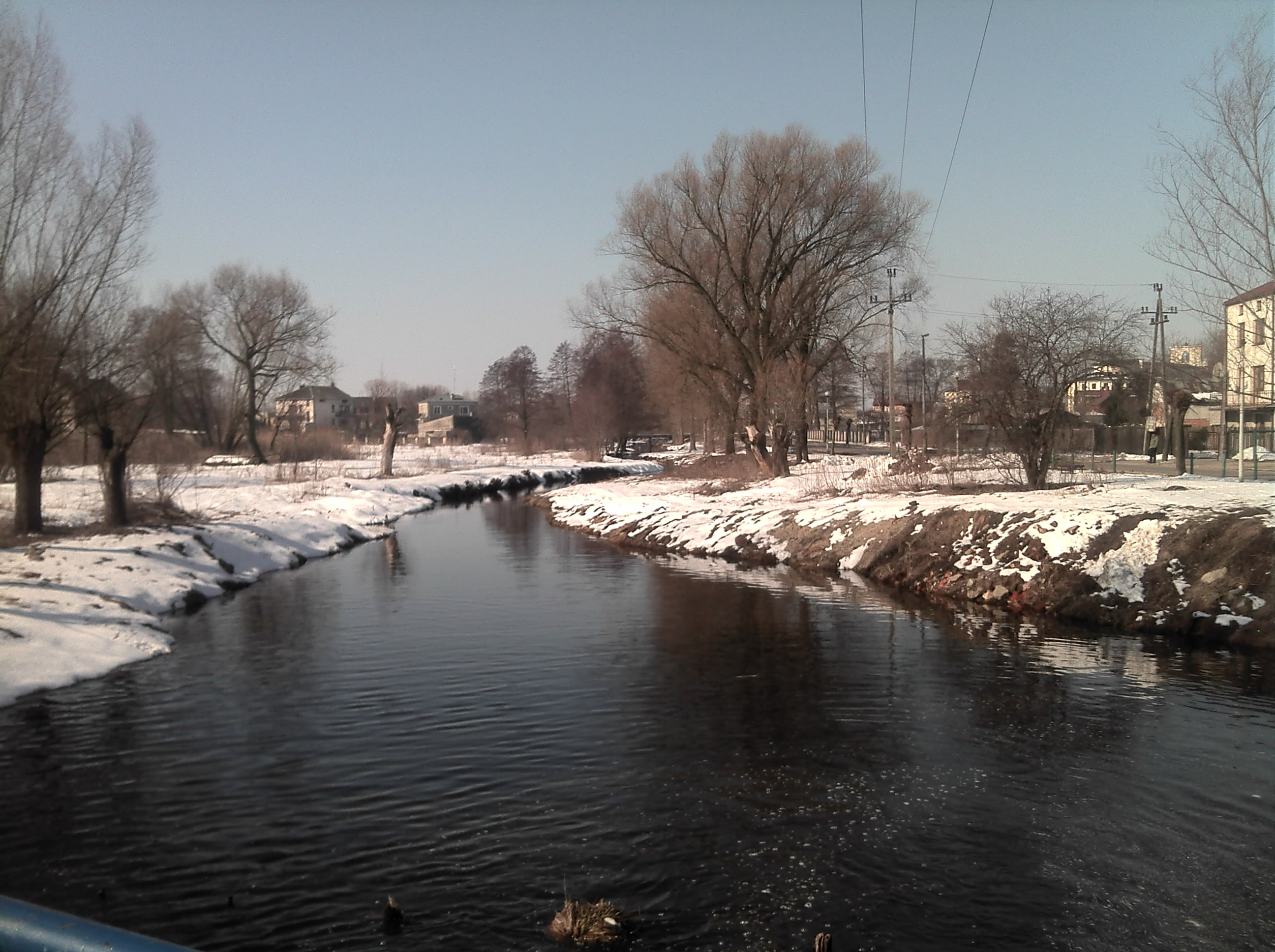 rzeka Promnik na wysokości Łaskarzewa